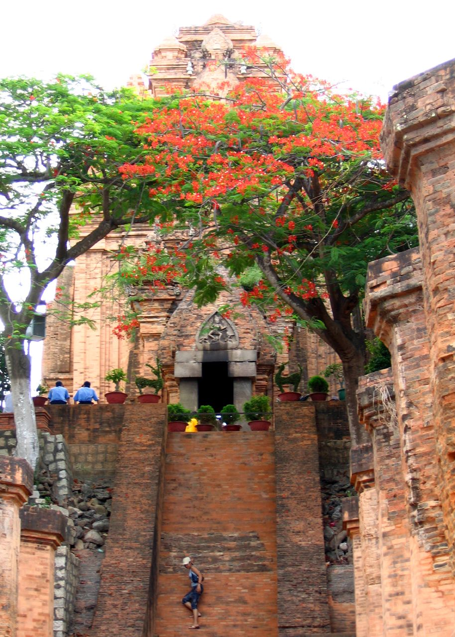 Po Nagar temple in Nha Trang.